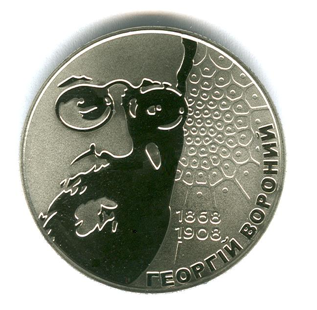 Монета Георгій Вороний реверс